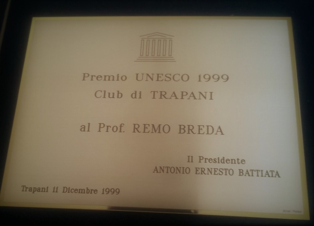 Da aggiungere alla biografia di Remo Breda